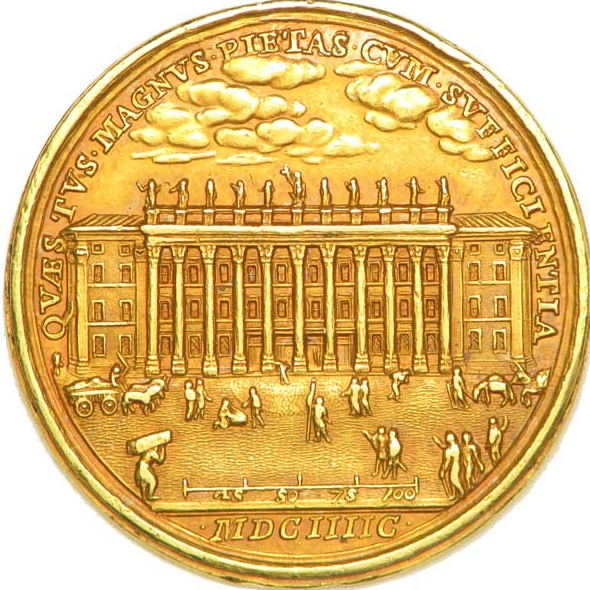 Rovescio di medaglia d'oro di papa Innocenzo XII (1695): rappresenta la Dogana di terra ricavata - per ordine del pontefice - da Carlo Fontana nei resti del Tempio di Adriano in piazza di Pietra a Roma.